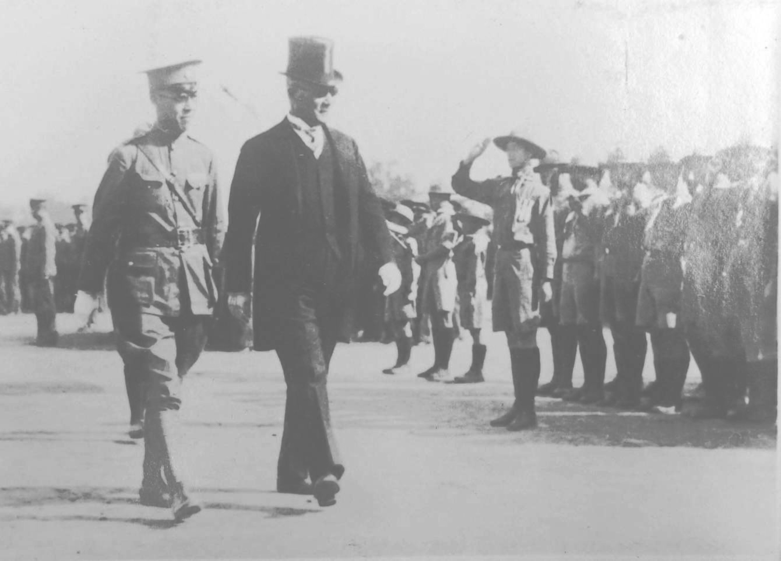 中文（中国大陆）: 张伯苓检阅参加军训的南开学生